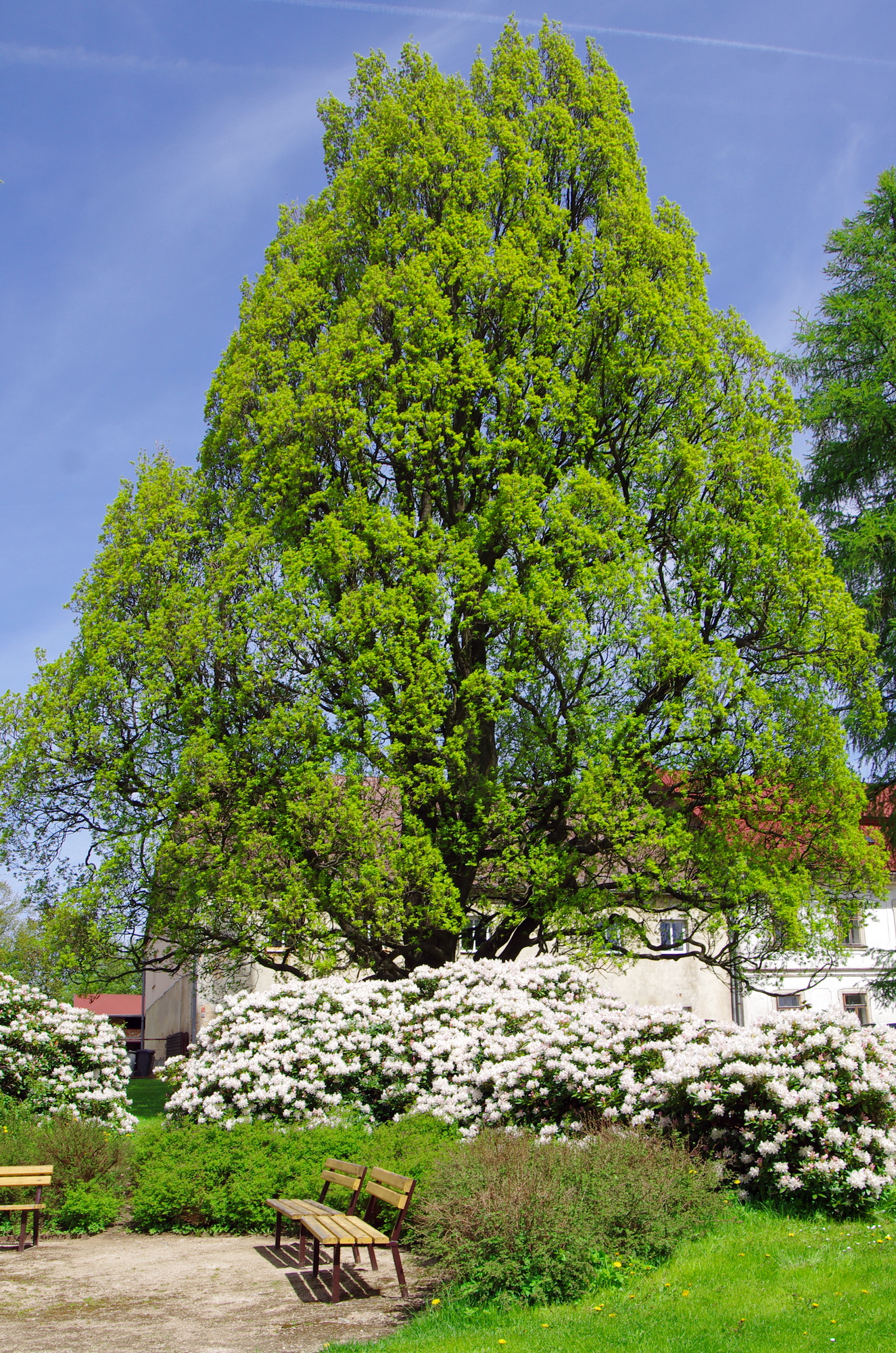 památný strom Tepelský dub, Teplá, okres Cheb